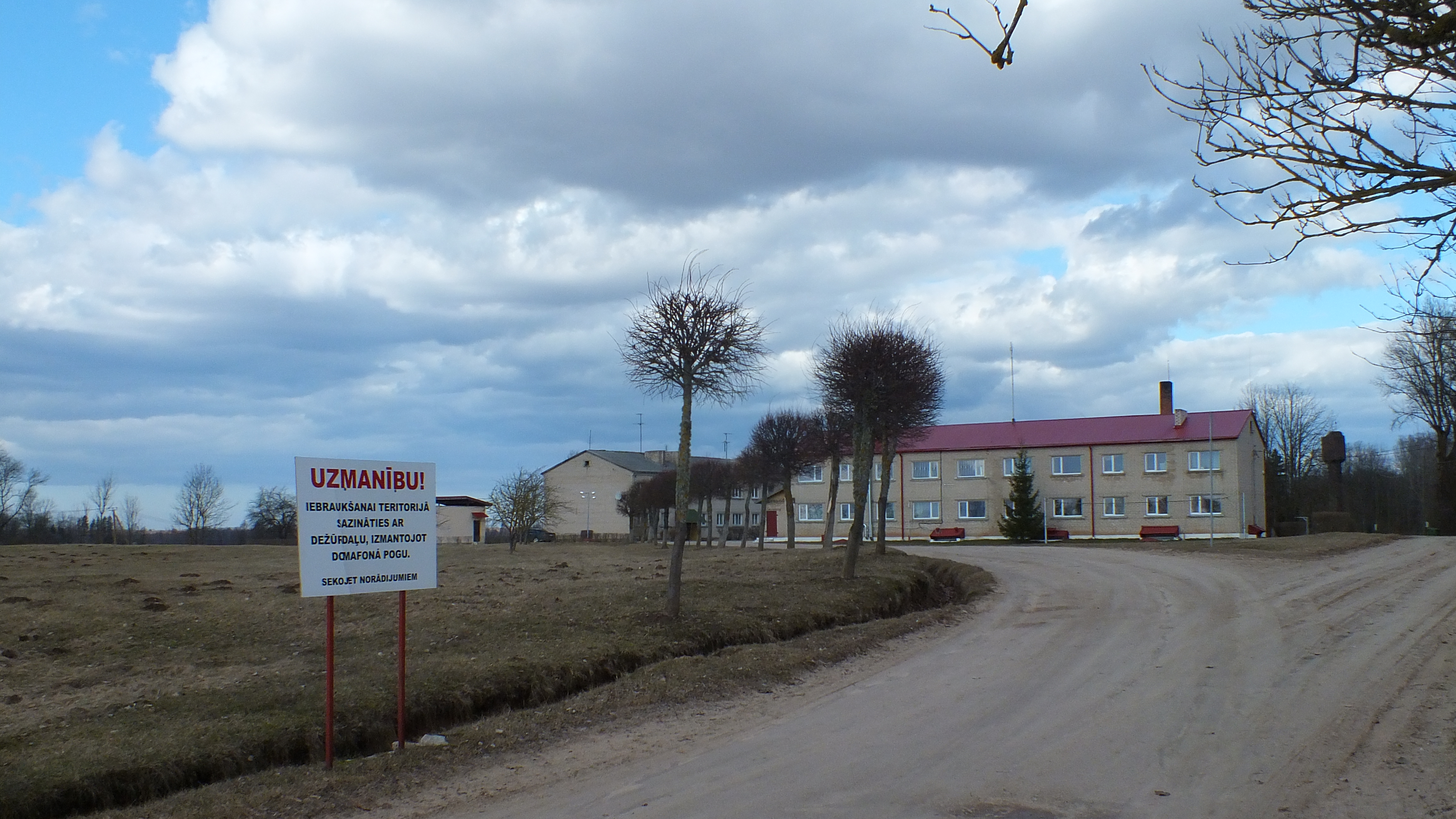 Vecumnieku cietums Klīvos